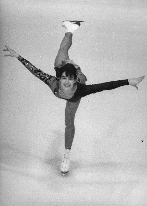 Katarina Witt ADN-ZB Thieme 9.1.1982 Karl-Marx-Stadt: DDR-Meisterschaften im Eiskunstlaufen.- Nach Pflicht und Kurzkür führt bei den Damen die 16-jährige Titelverteidigerin Katarina Witt (Foto von der Kurzkür am 8.1.) vom gastgebenden Karl-Marx-Städter Sportclub mit 1,0 Punkten. Abgebildete Person: Witt, Katarina (GND 11884508X)